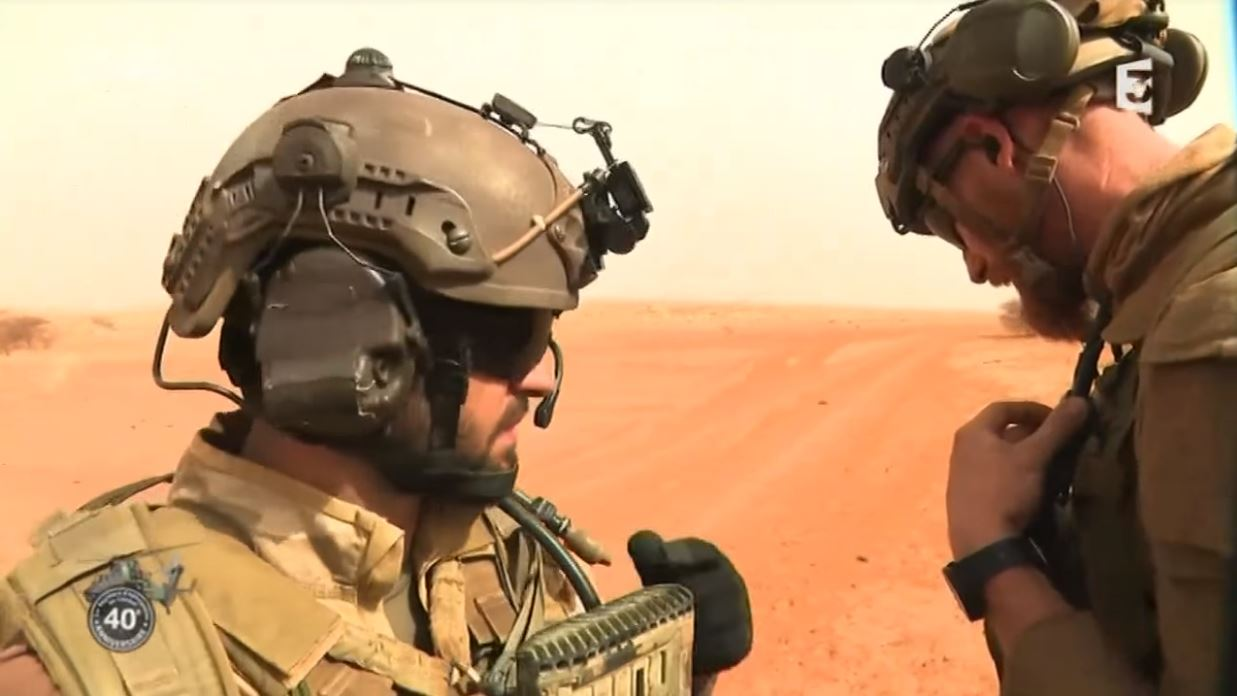 Miliaires français et maliens au nord-est de Gao en 2017